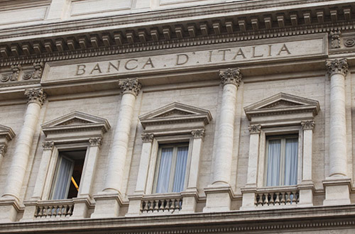 Центральним банком Італії є Банк Італії, заснований в 1893 році.